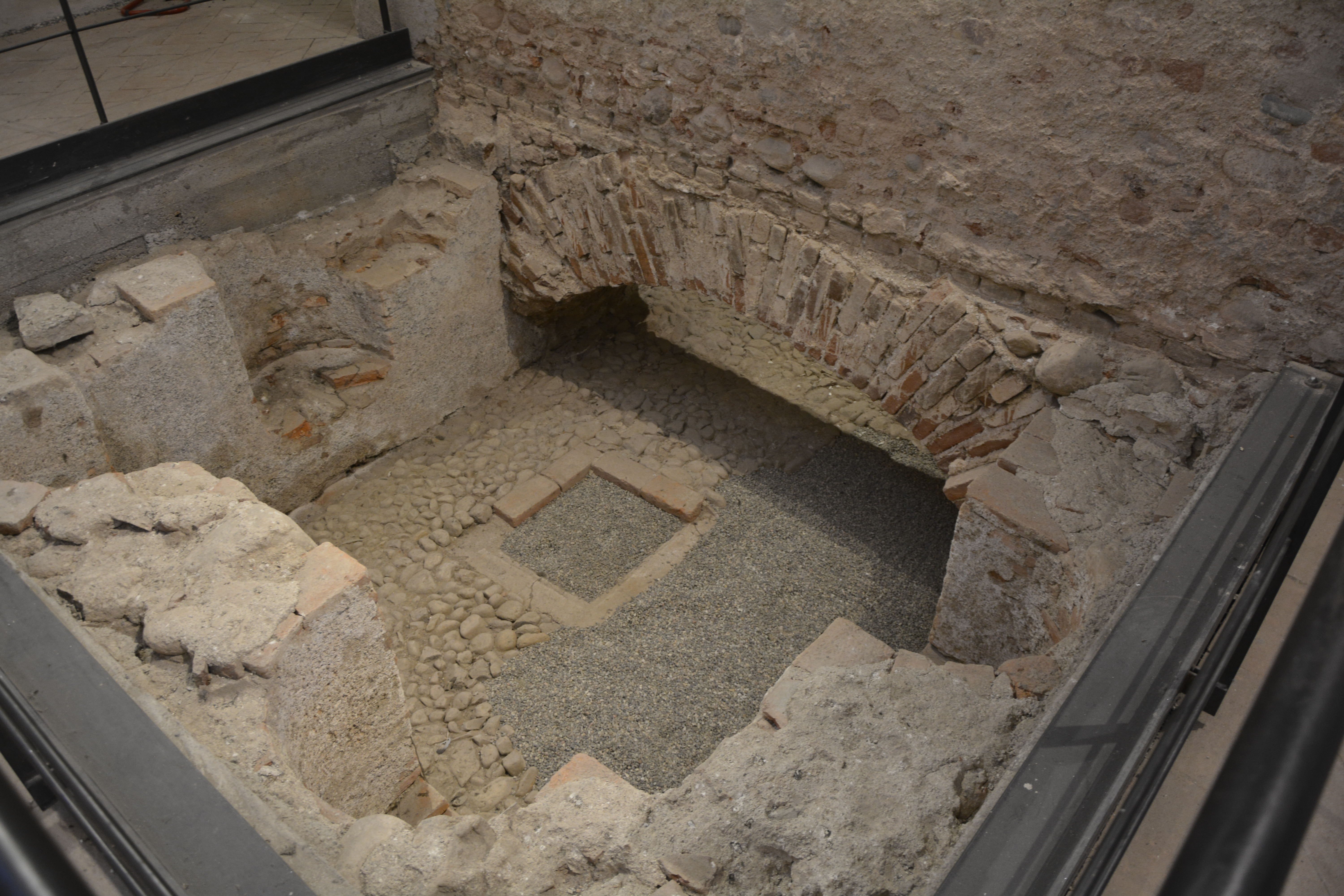 La cripta sepolcrale nella chiesa del monastero di Cairate, in provincia di Varese.